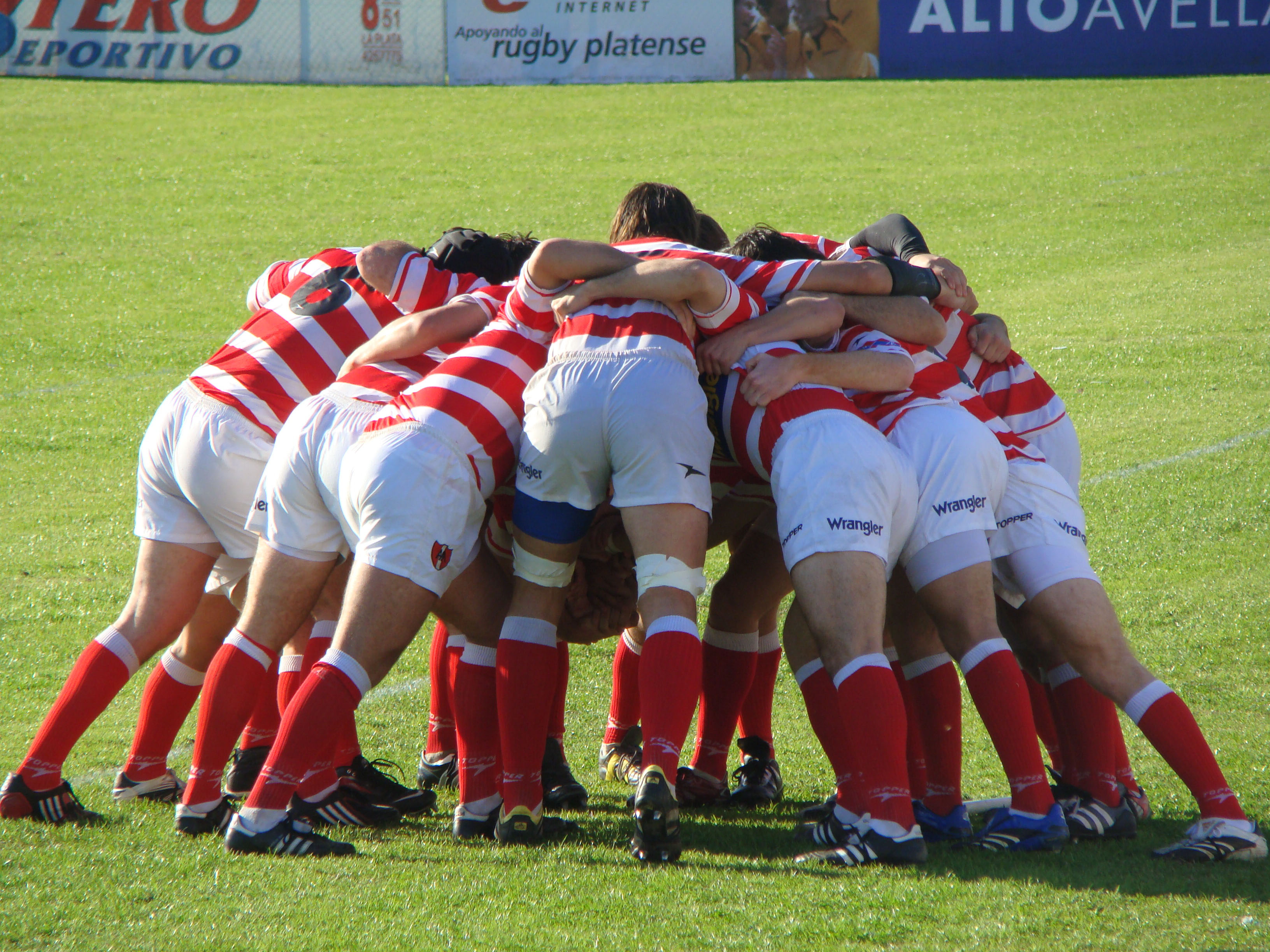 Alumni vs La Plata, in 2008